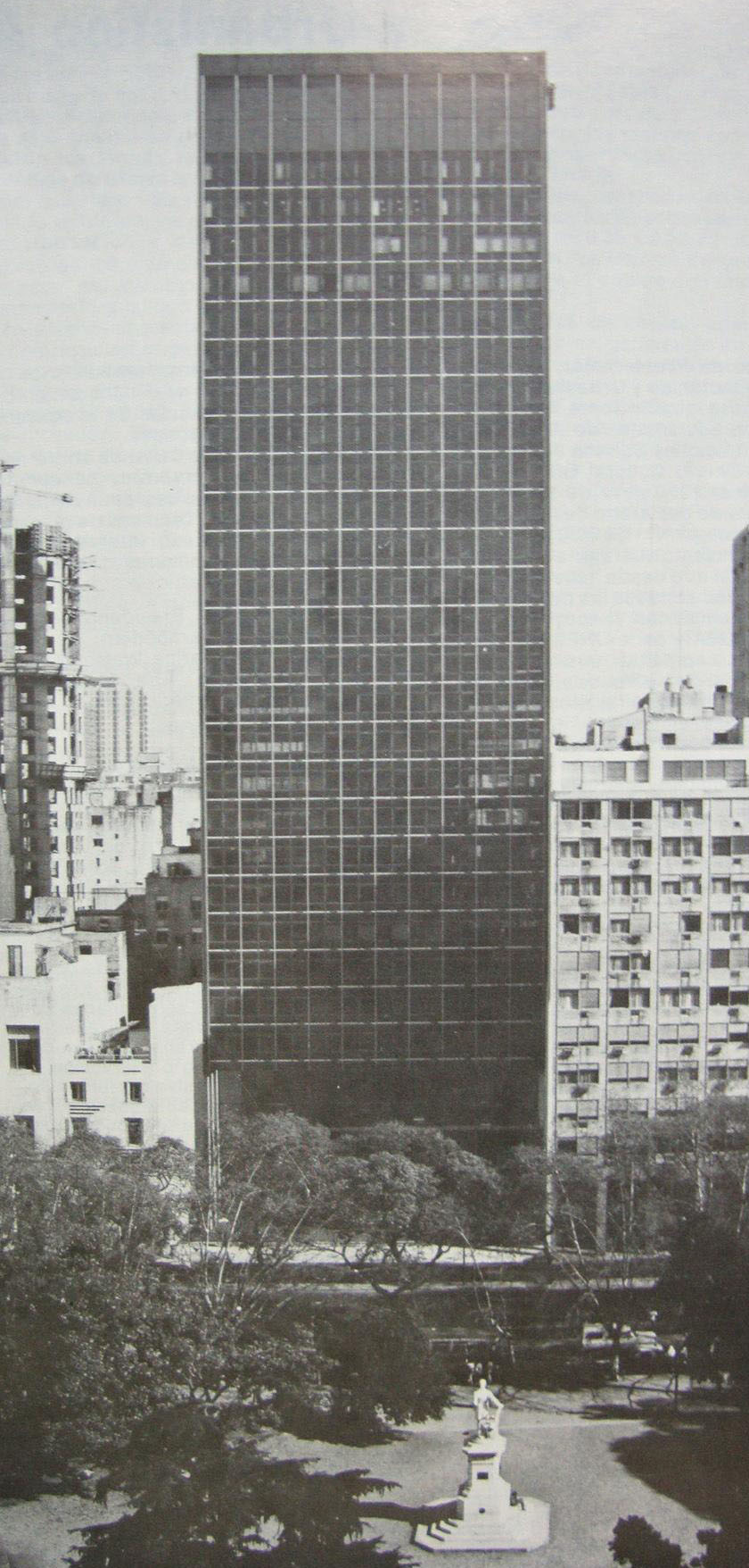 Edificio Torre CHACOFI, torre de oficinas de alquiler propiedad de la compañía de desarrollos inmobiliarios CHACOFI. Arquitecto: Mario Roberto Álvarez y Asociados Año: 1974-1980 Dirección: Av. Leandro N. Alem 558 Buenos Aires, Argentina.